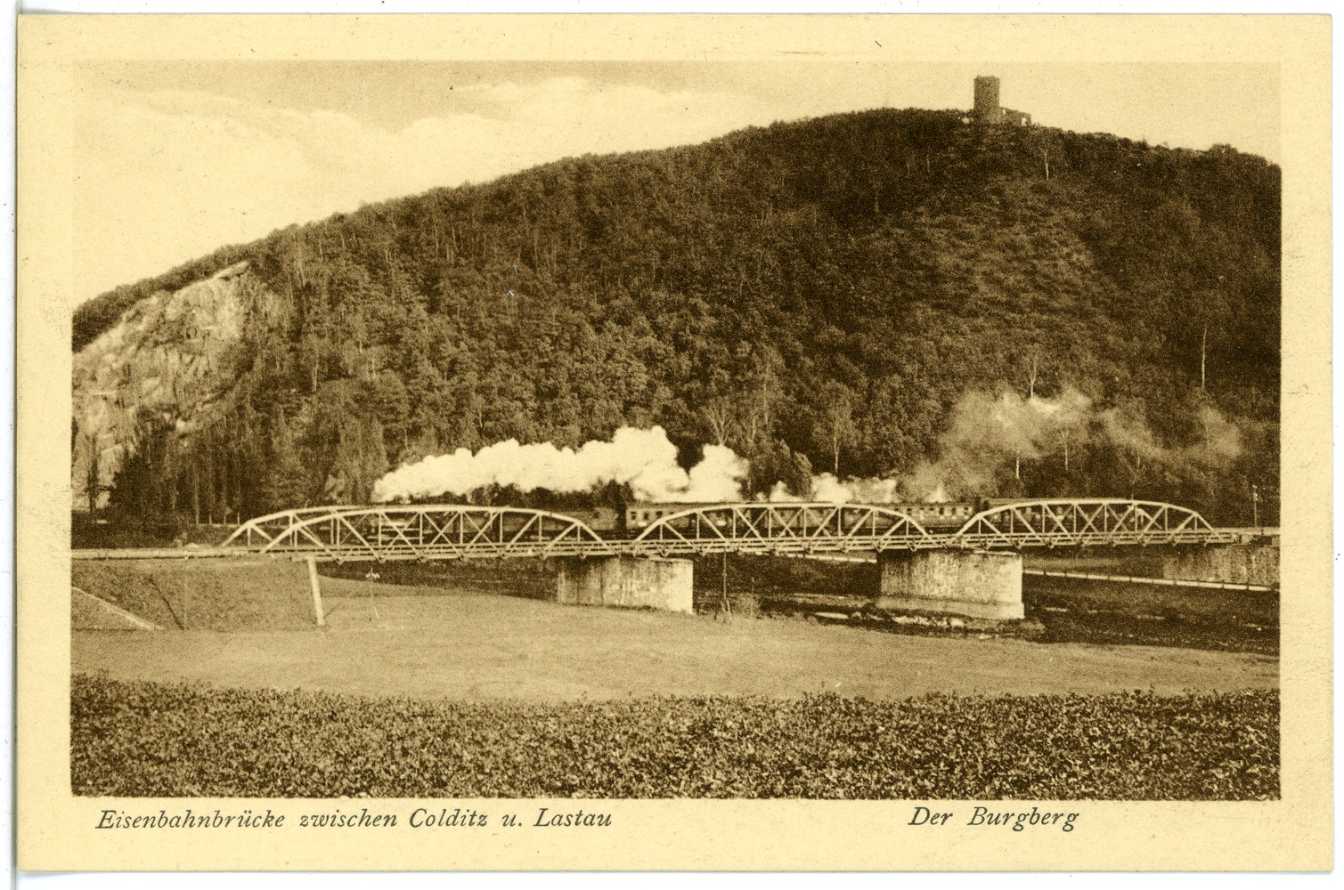 Colditz; Eisenbahnbrücke zwischen Colditz und Lastau This postcard is from publisher Brück & Sohn in Meißen ( postcard has a unique number 17513 and is available in a higher resolution at the publisher. This images was uploaded in a cooperation project between Wikipedians and the publisher.